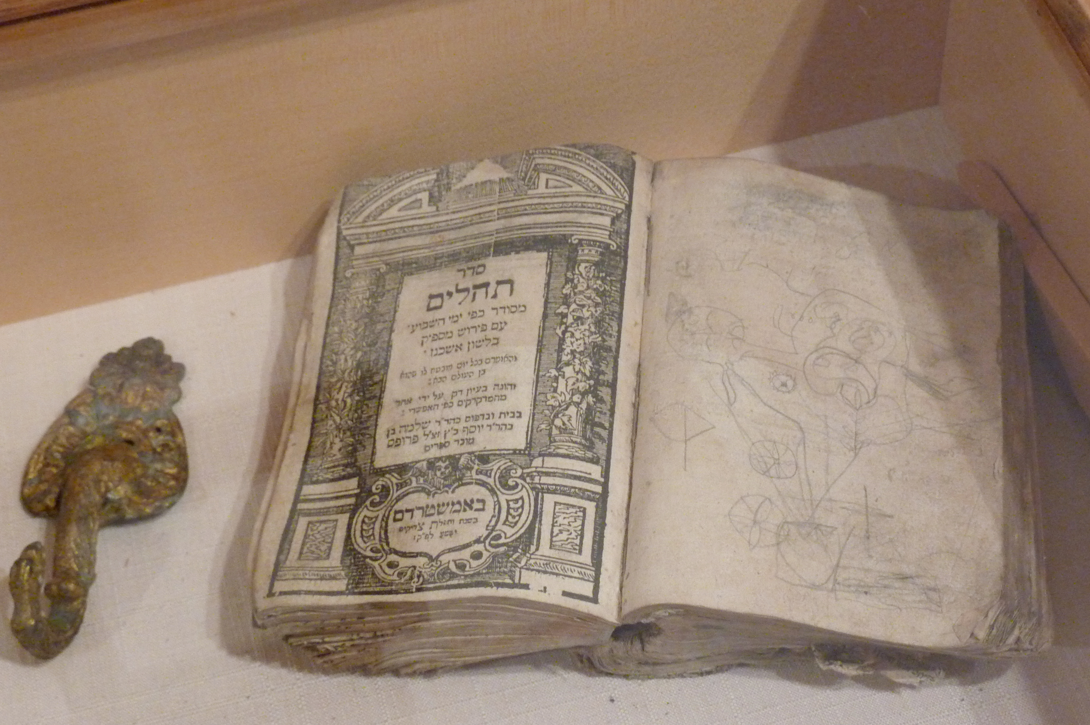 Genisa Niederzissen, Ausstellung in der ehemaligen Synagoge in Niederzissen im Landkreis Ahrweiler (Rheinland-Pfalz), Buch mit Gebeten und Psalmen, erschienen 1729/30 bei Schlomo Proops in Amsterdam; mit Kritzeleien auf der rechten Seite (Falk Wiesemann (Hrsg.): Zeugnisse jüdischen Lebens in Niederzissen. Genisa-Funde in der ehemaligen Synagoge. Kultur- und Heimatverein Niederzissen, Niederzissen 2012, ISBN 978-3-00-039493-5)